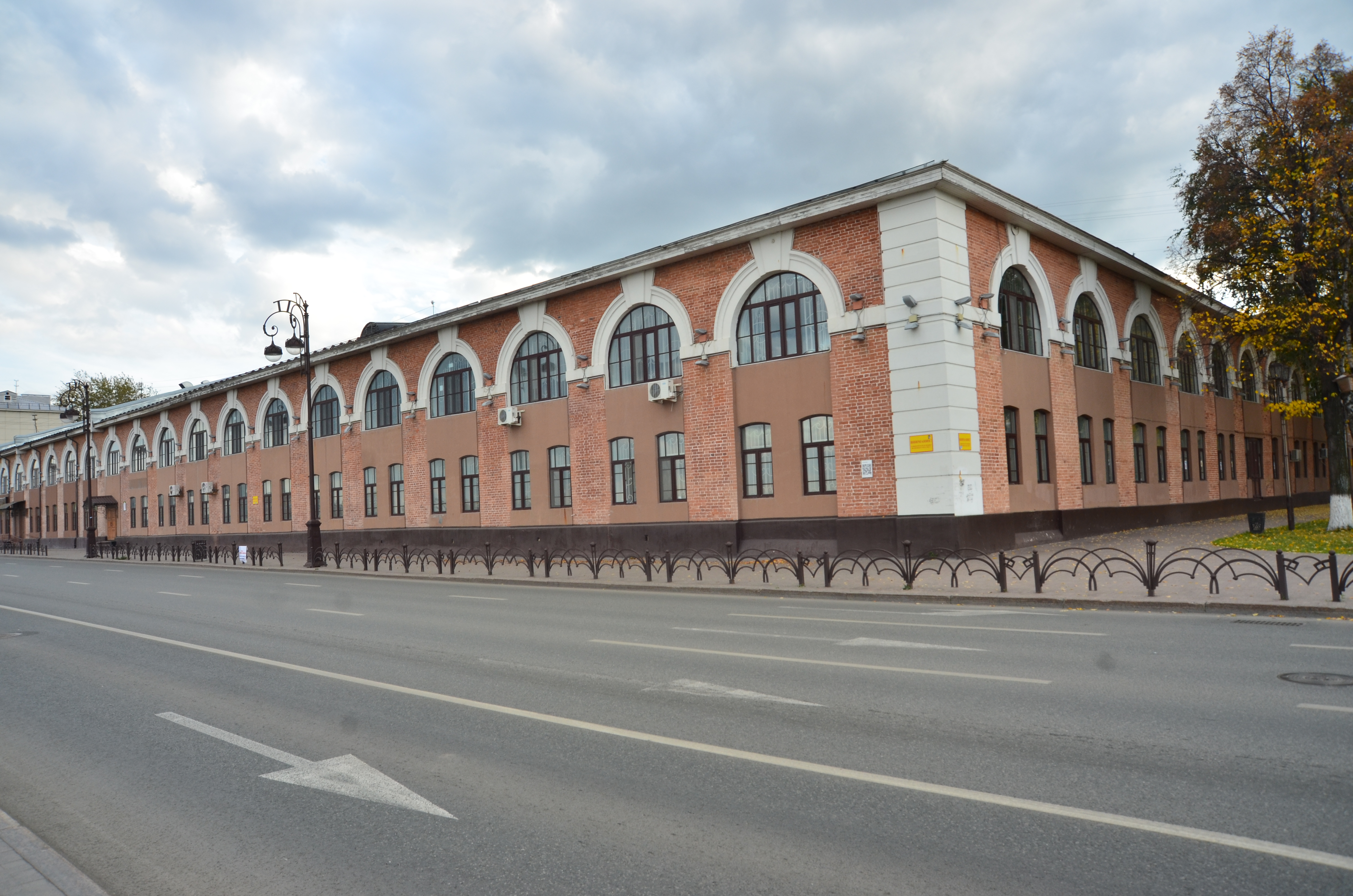 Здание, в котором помещался Гостиный двор - центр торговли: улица Республики, 2 / улица Республики, 6, Тюмень, Тюменская область